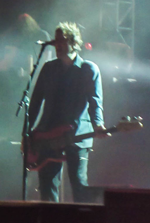 2012-12-07-0068.jpg